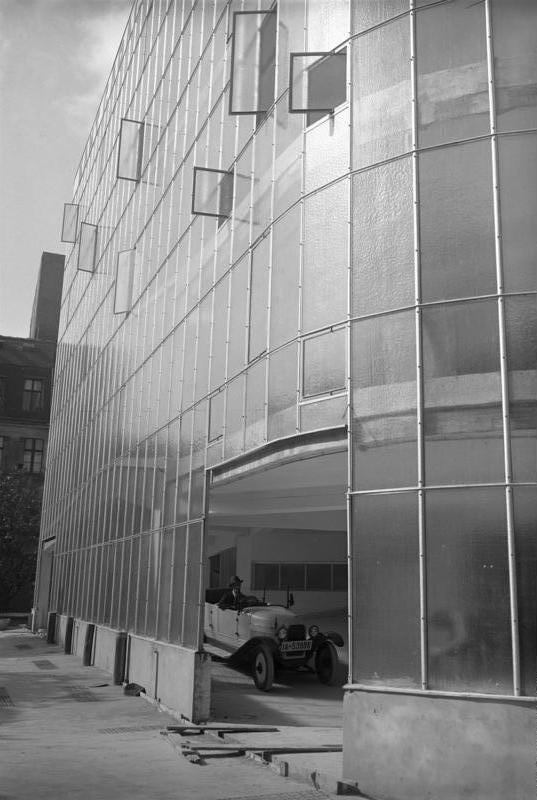 Ein modernes Auto-Hotel aus Glas ! Blick auf die Glas-Fassade des modernsten Auto-Hotels Berlins, dessen Bau über 2 1/2 Millionen Mark kostete und über 400 Autos beherbergen kann. Kant-Garage in Berlin-Charlottenburg.